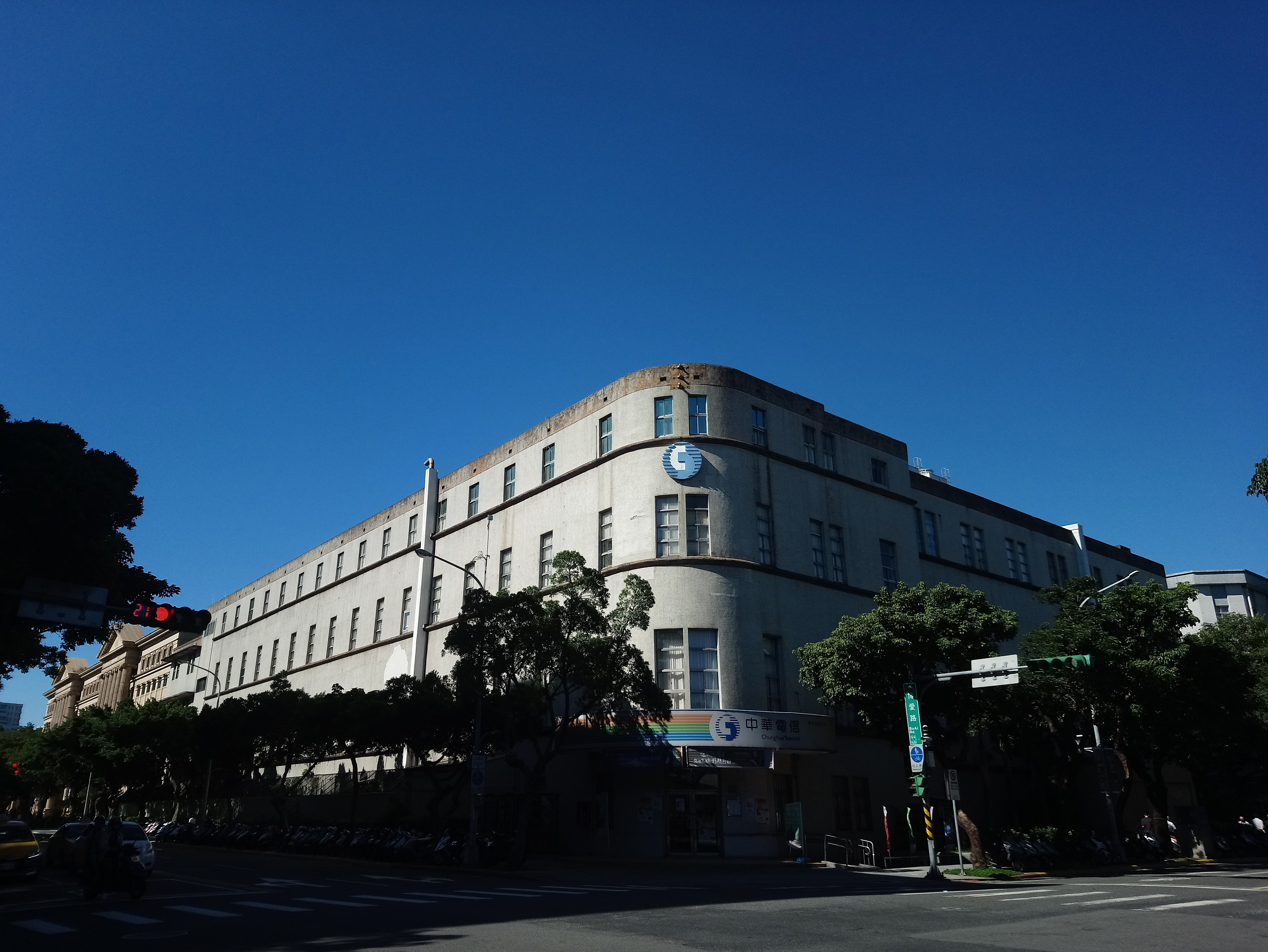 臺灣總督府電話交換局,臺北市中正區城內次分區建國里